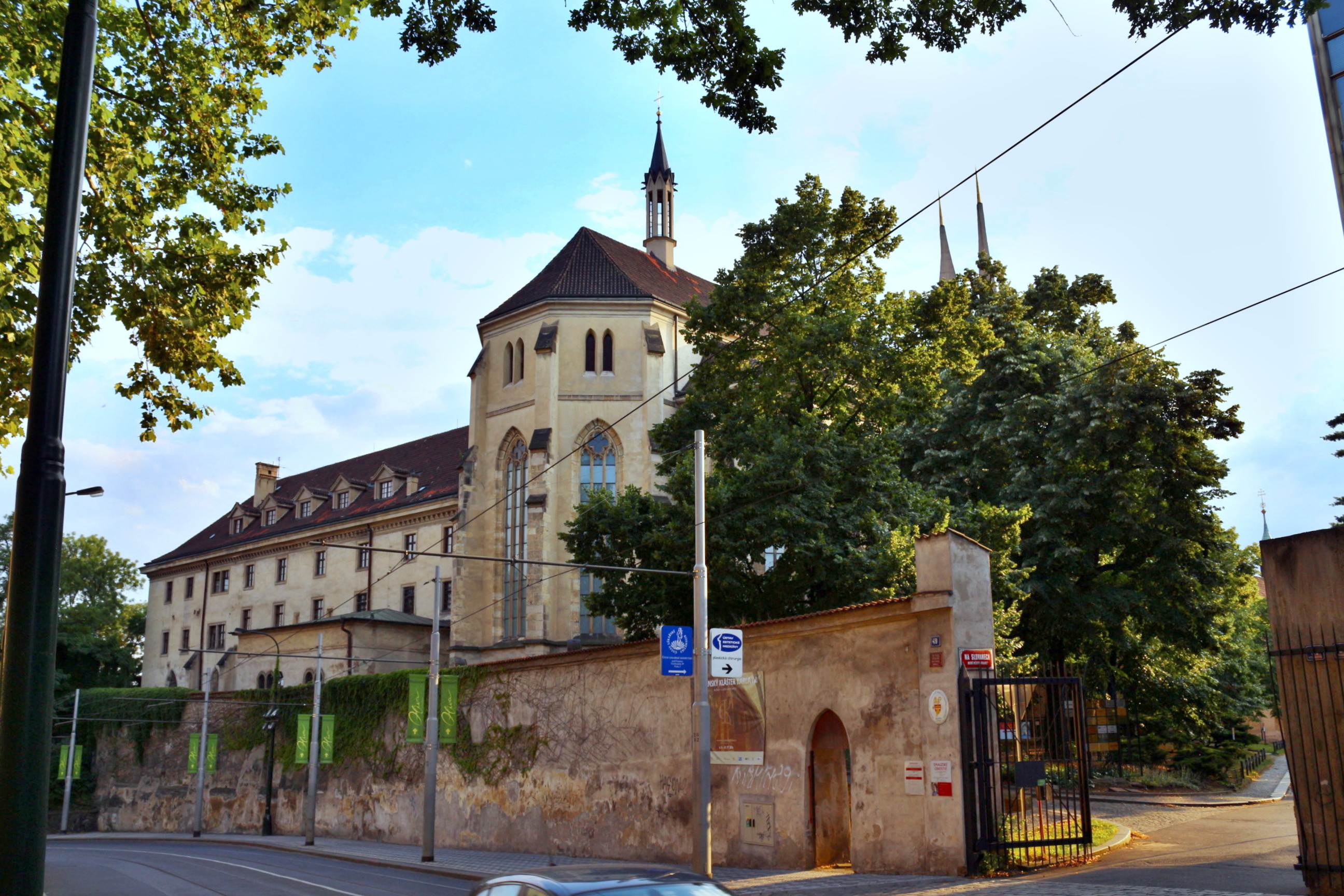 Emauzský klášter